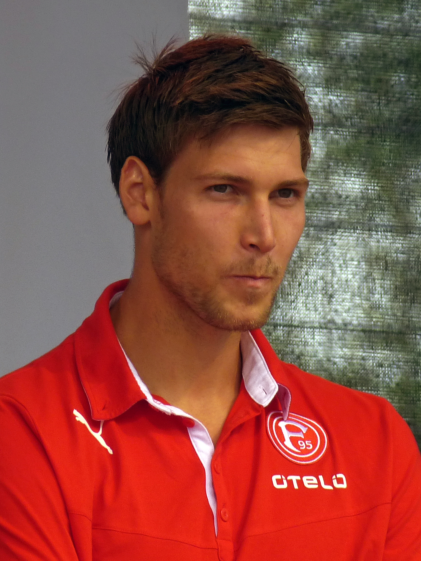 Fabian Giefer, deutscher Fußballtorwart